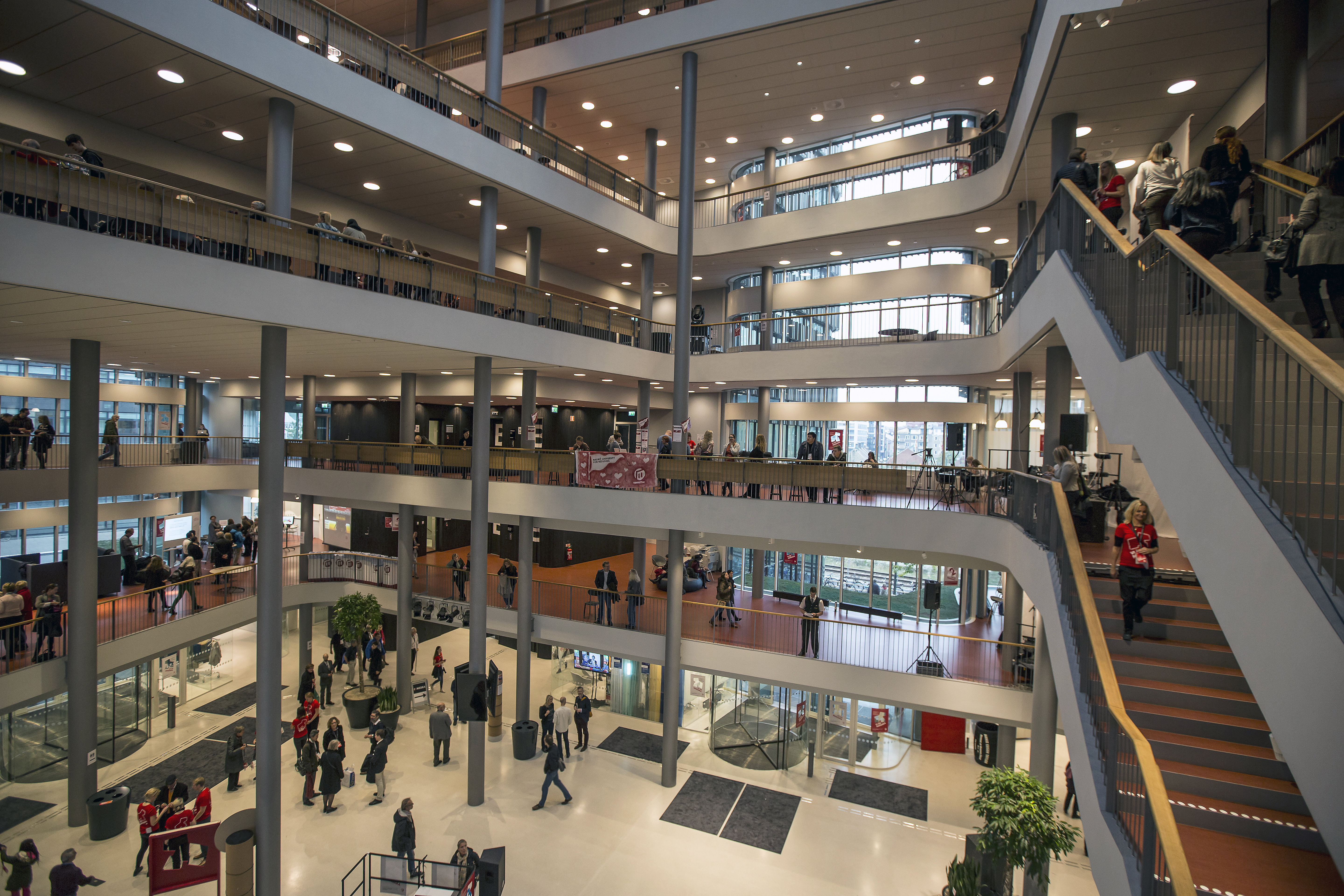 Invigning av Malmö högskolas nya byggnad Niagara 20151015 Foto: News Øresund - Johan Wessman © News Øresund, (CC BY 3.0) Detta verk av News Øresund är licensierat under en Creative Commons Erkännande 3.0 Unported-licens (CC BY 3.0). Bilden får fritt publiceras under förutsättning att källa anges (Foto: News Øresund + fotografnamn). The picture can be used freely under the prerequisite that the source is given .News Øresund är en oberoende dansk-svensk nyhets-byrå som ingår i Øresundsinstituttet.